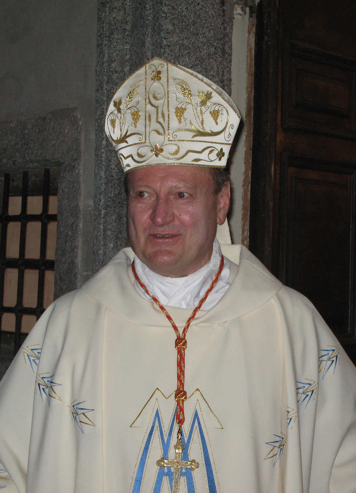 Card. Gianfranco Ravasi